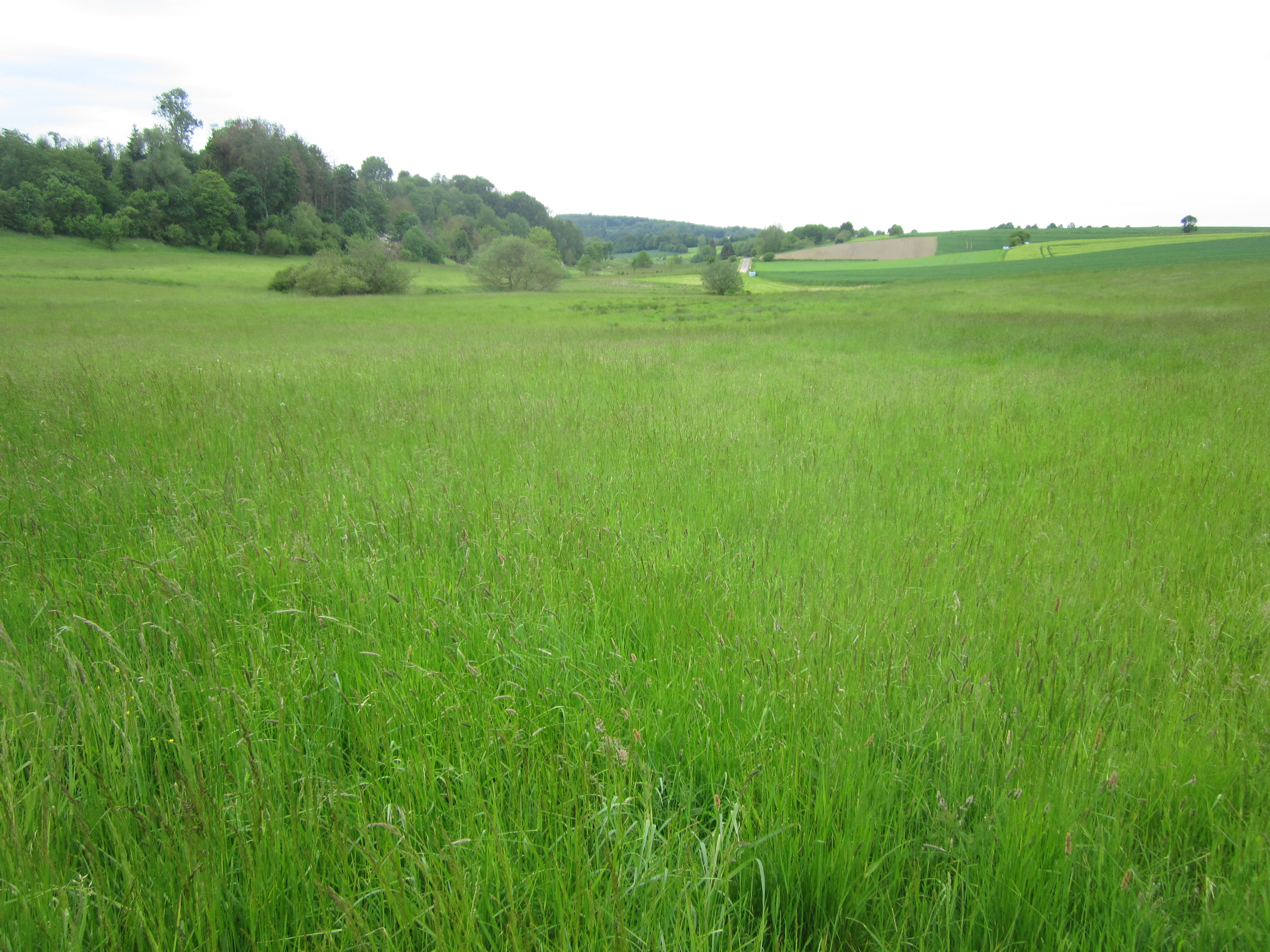 Naturschutzgebiet Bremer Bachaue (Blick von L 673 nach Südwesten).